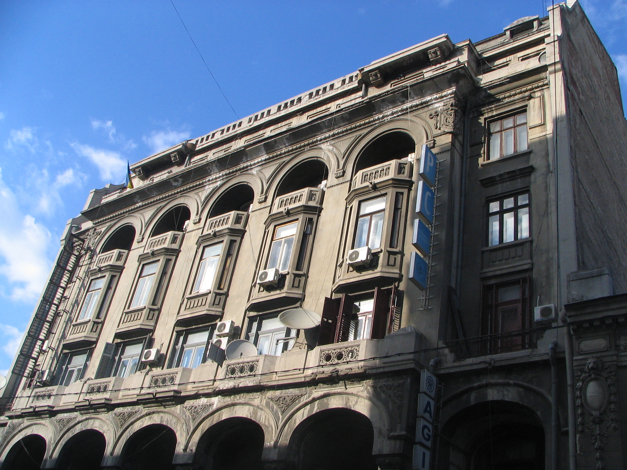 Sediu Partidul Conservator